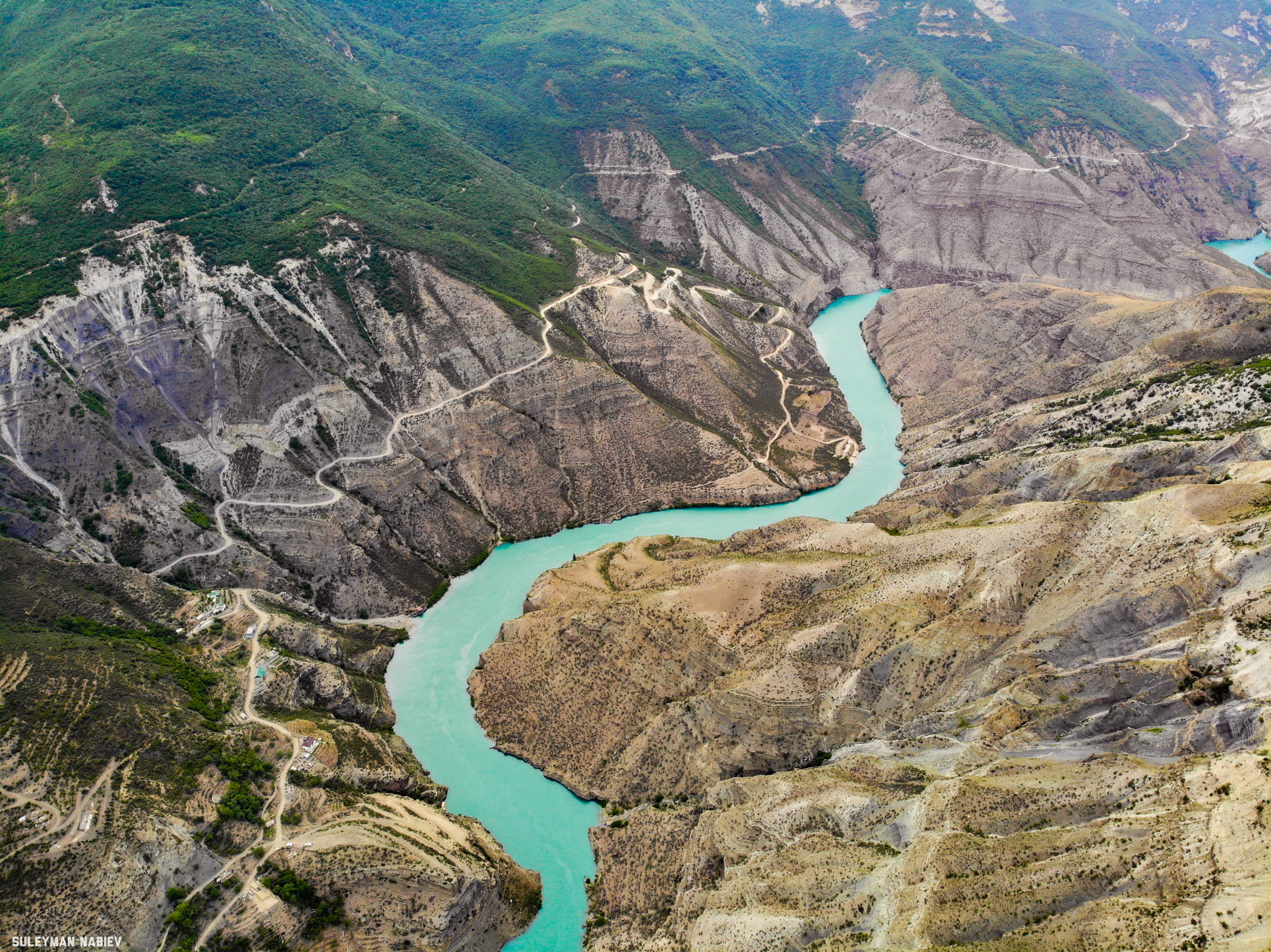 Сулакский каньон